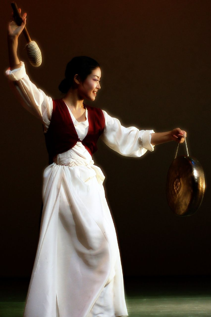 Korean dance